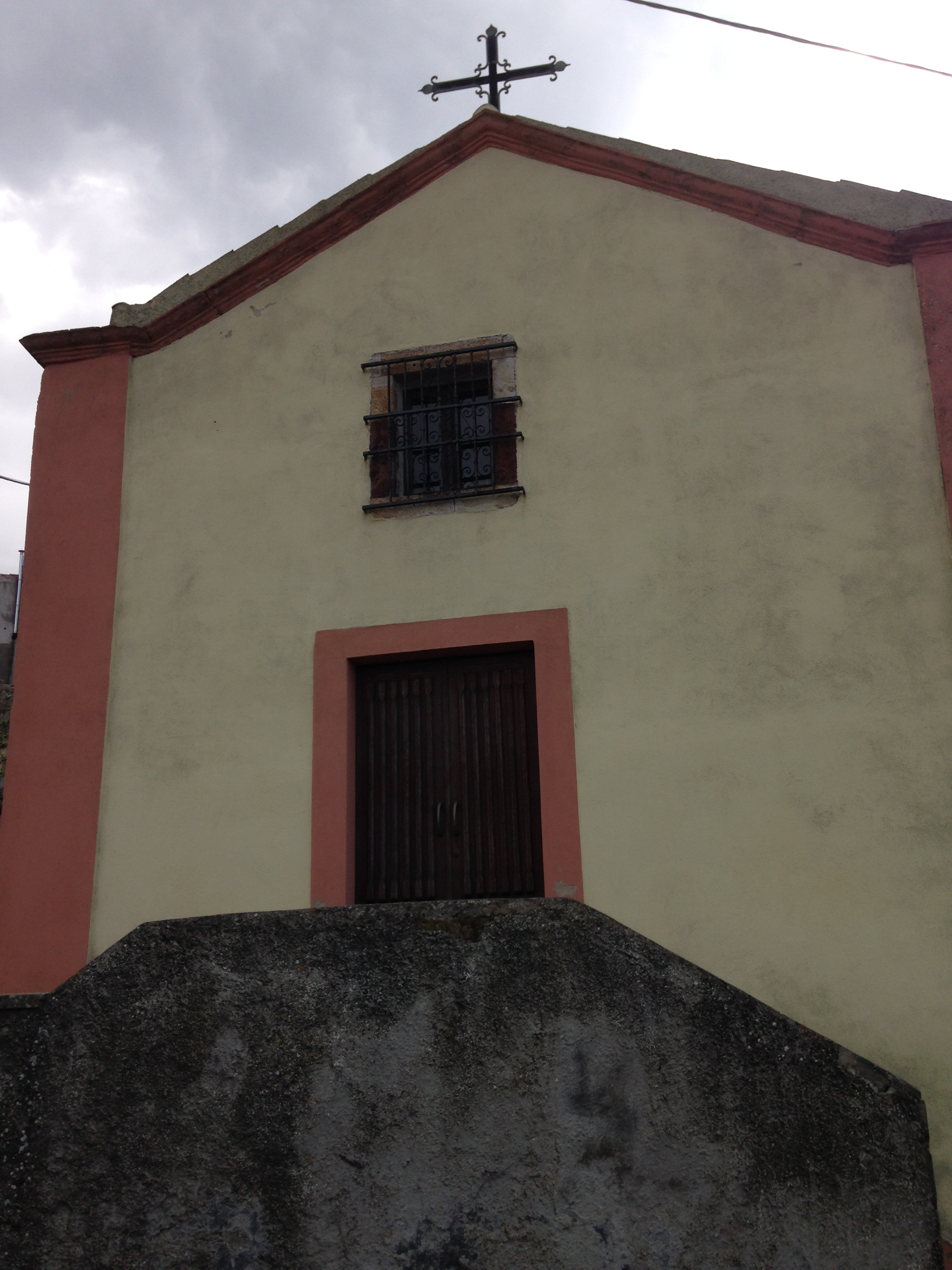 Facciata della chiesa